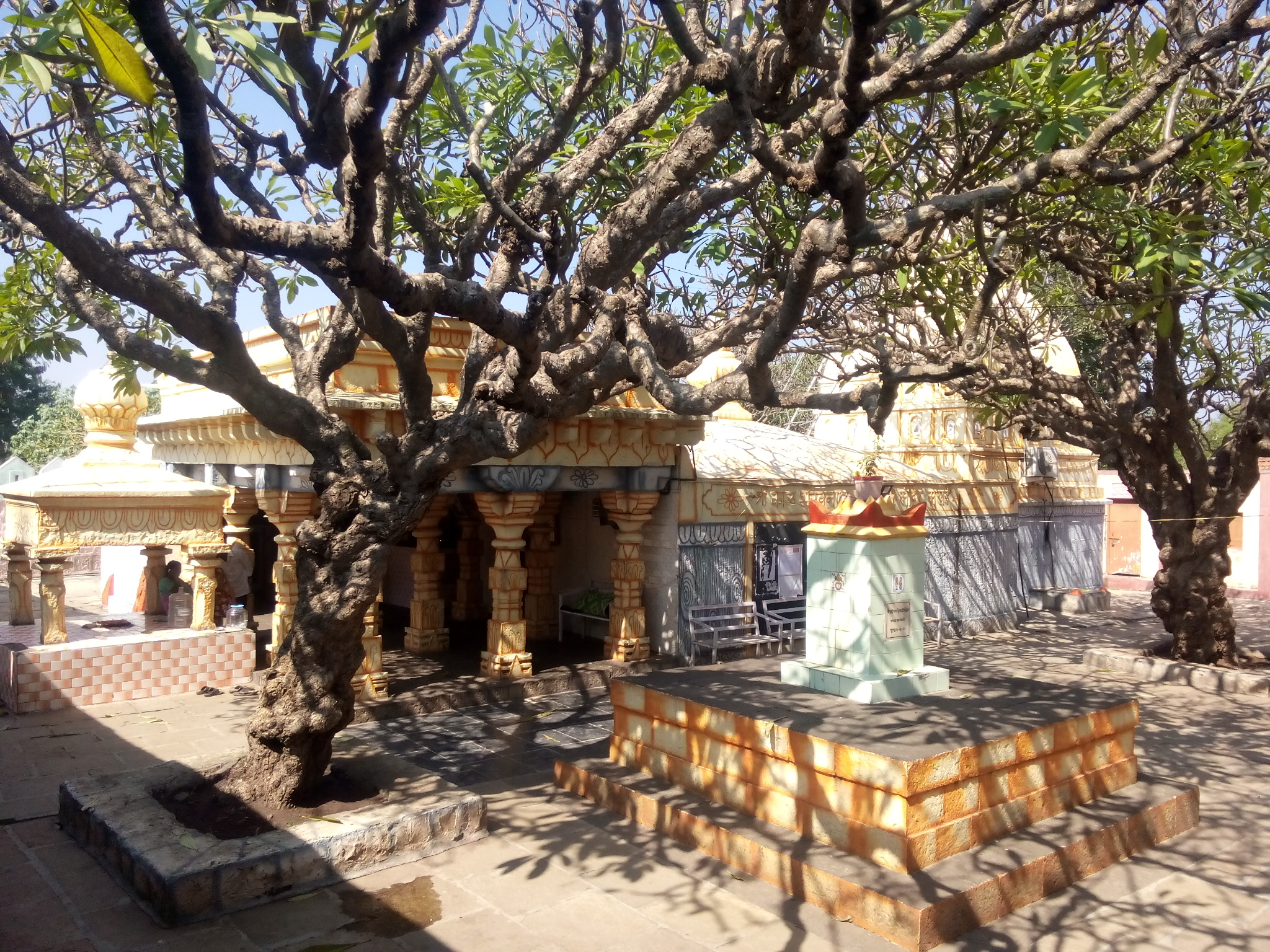 photo